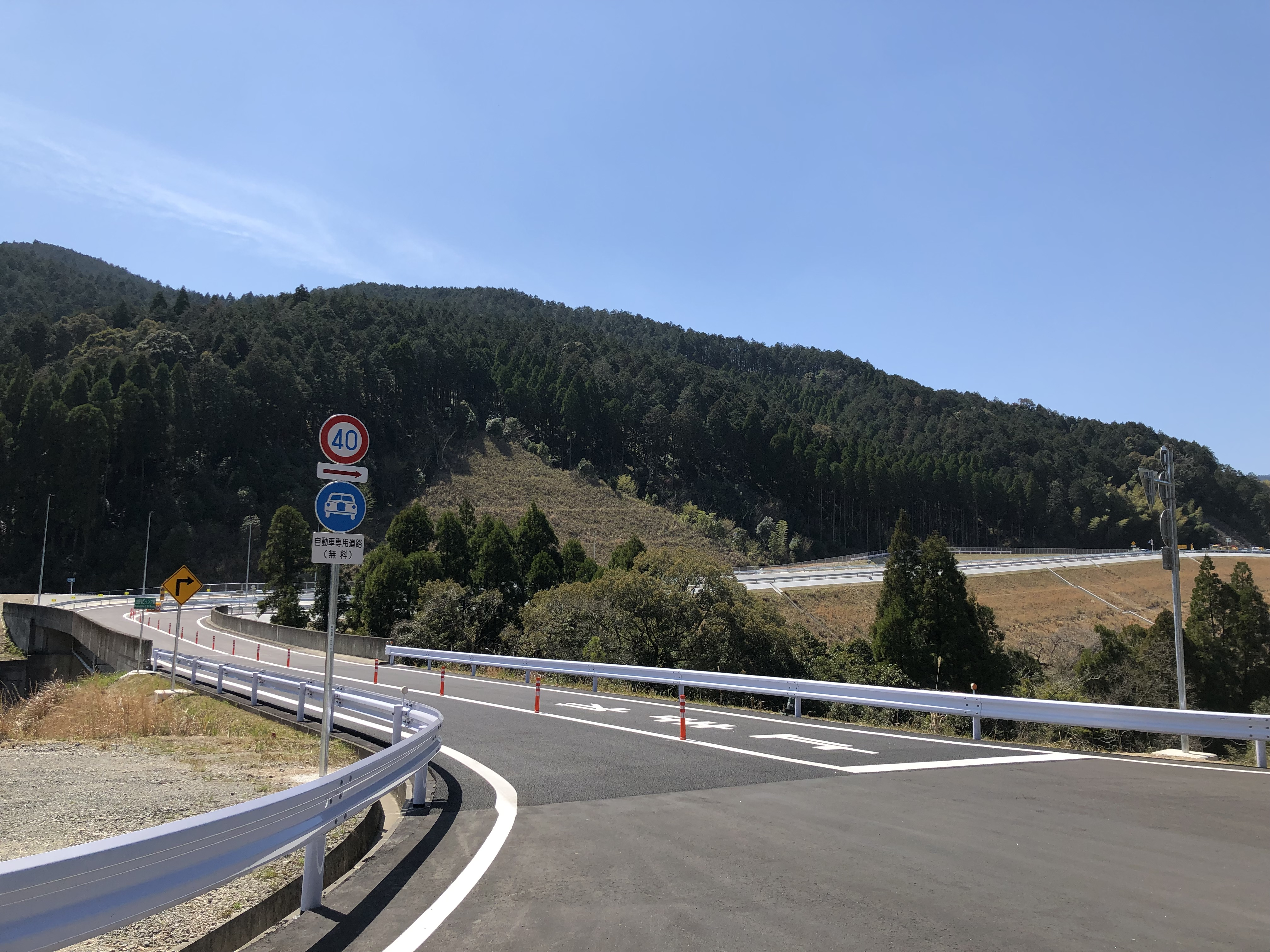 さつま泊野ICの入り口